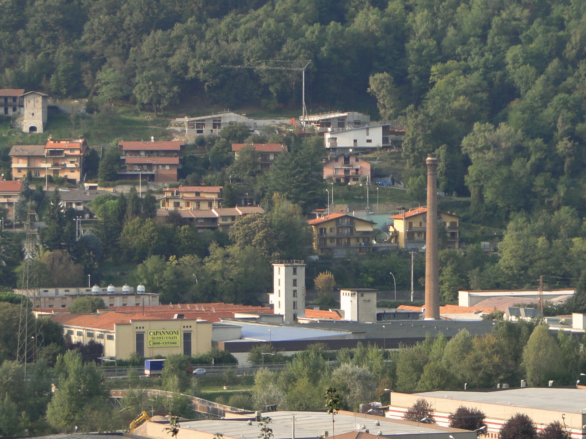 zona industriale Crespi, Nembro (BG)